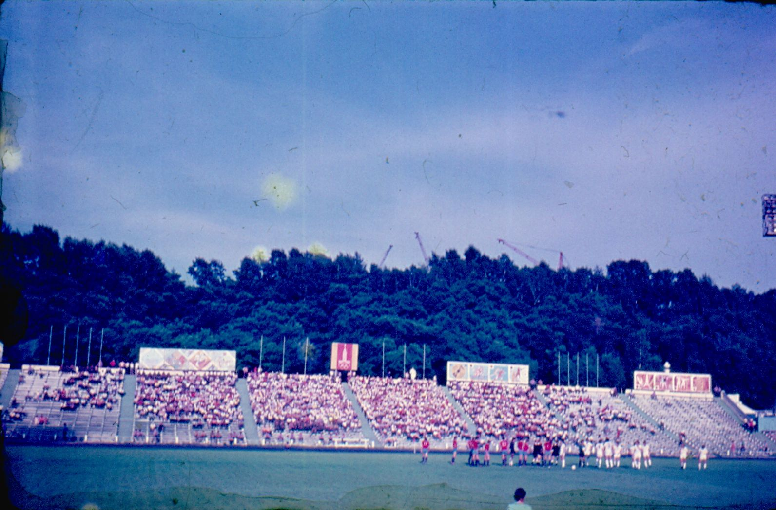 СКА Хабаровск. 1980 год, лето